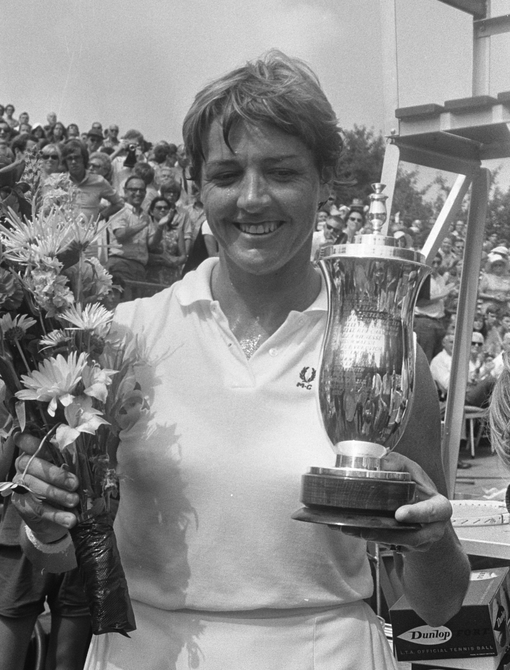 Collectie / Archief : Fotocollectie Anefo Reportage / Serie : [ onbekend ] Beschrijving : Internationaal tennistoernooi in Hilversum ( t Melkhuisje winnares Margaret Court met beker Datum : 2 augustus 1970 Locatie : Hilversum Trefwoorden : bekers, tennis, winnaars Persoonsnaam : Court, Margaret Fotograaf : Koch, Eric / Anefo Auteursrechthebbende : Nationaal Archief Materiaalsoort : Negatief (zwart/wit) Nummer archiefinventaris : bekijk toegang 2.24.01.05 Bestanddeelnummer : 923-7226